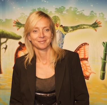 Presentatrice Floortje Dessing bij de Europese première van het Cirque du Soleil in Amsterdam (oktober 2010)